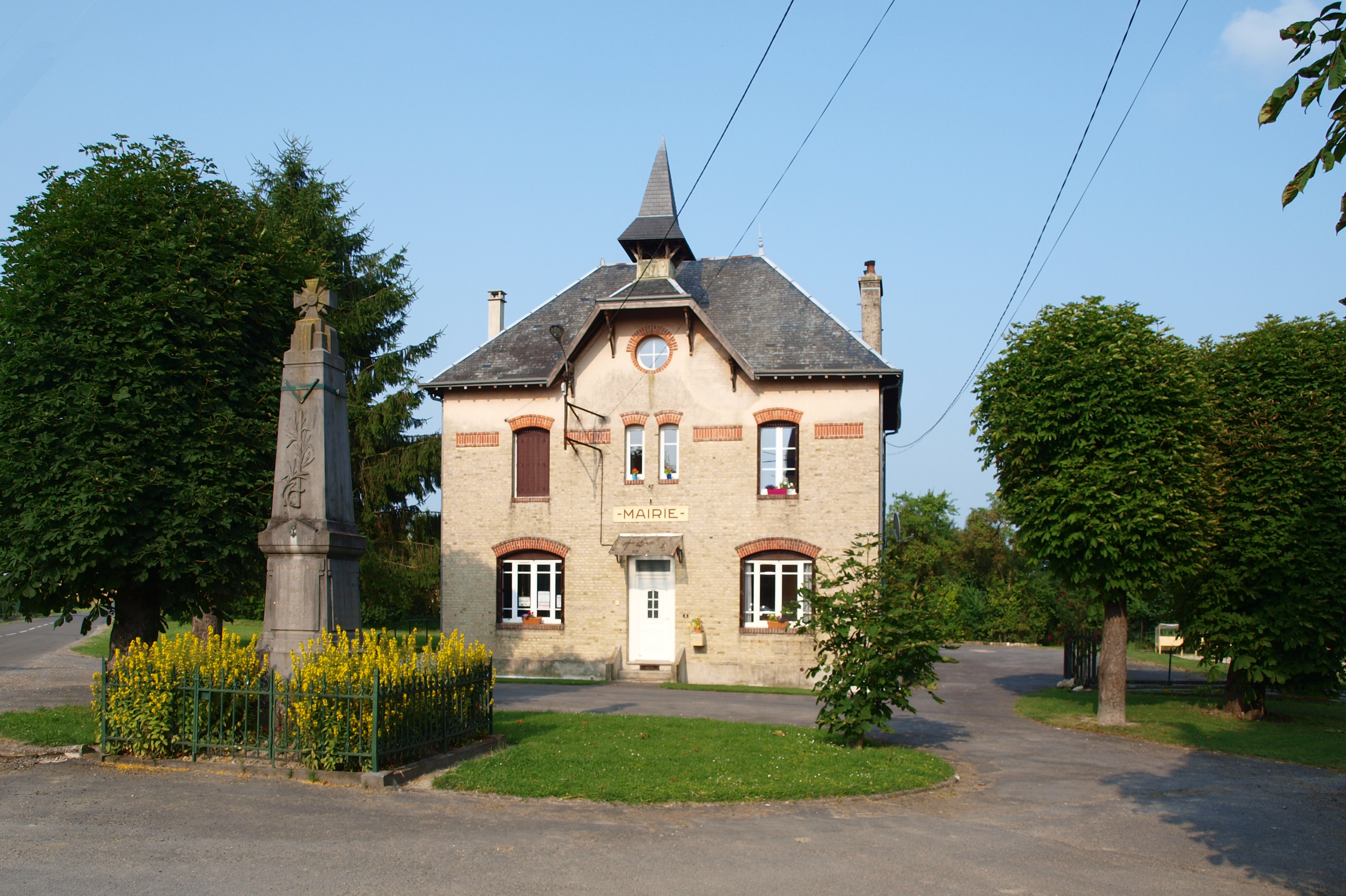 Sainte-Marie (Ardennes, France) , mairie & monument aux morts